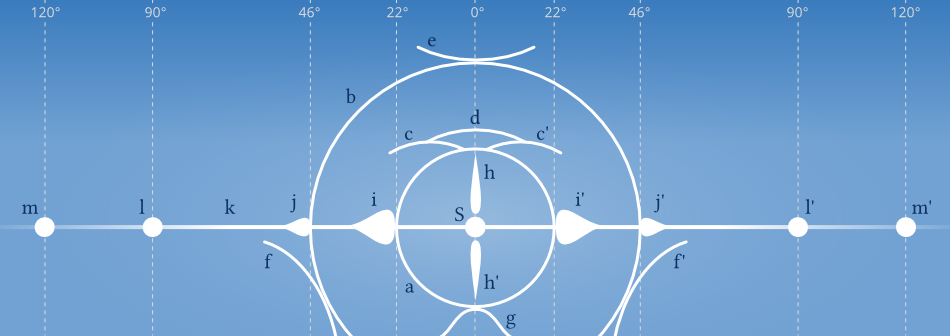 Représentation plane des principaux halos solaires : a, halo de 22° ; b, halo de 46° ; c, c', ars tangents supérieurs ; d, arc de Parry ; e, arc circumzénital ; f, f', arcs infralatéraux ; g, arc tangent inférieur ; h, h', colonnes lumineuses — i, i', parhélie de 22° ; j, j', parhélie de 46° ; k, cercle parhélique ; l, l', parhélie de 90° ; m, m', parhélie de 120° ; S, soleil. L'anthélie, tache lumineuse opposée au soleil, à 180°, n'est pas représentée. Polices d'écriture utilisées : Open Sans (degrés) et Linux Libertine (lettres).